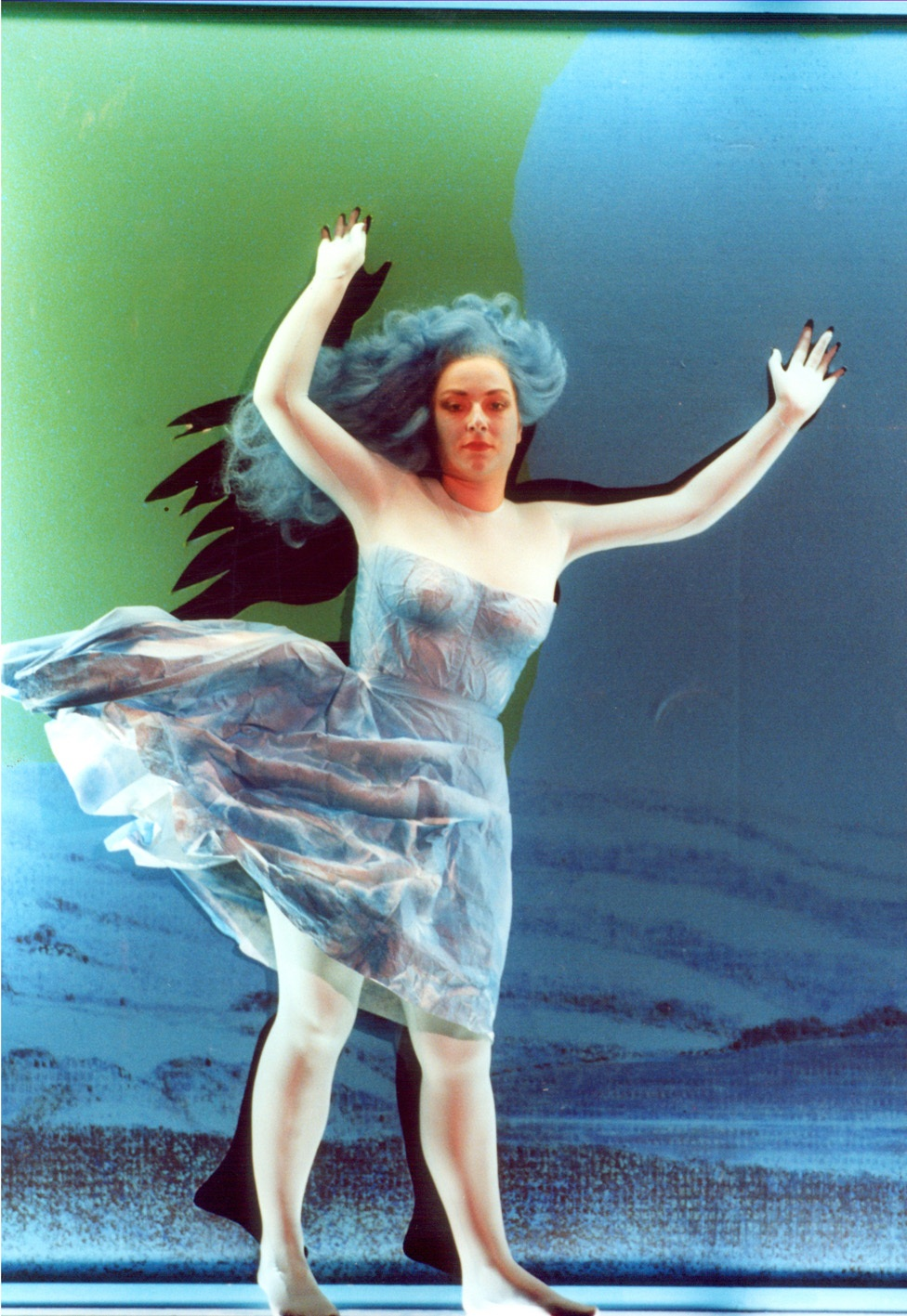 האופרה רינלדו 2002